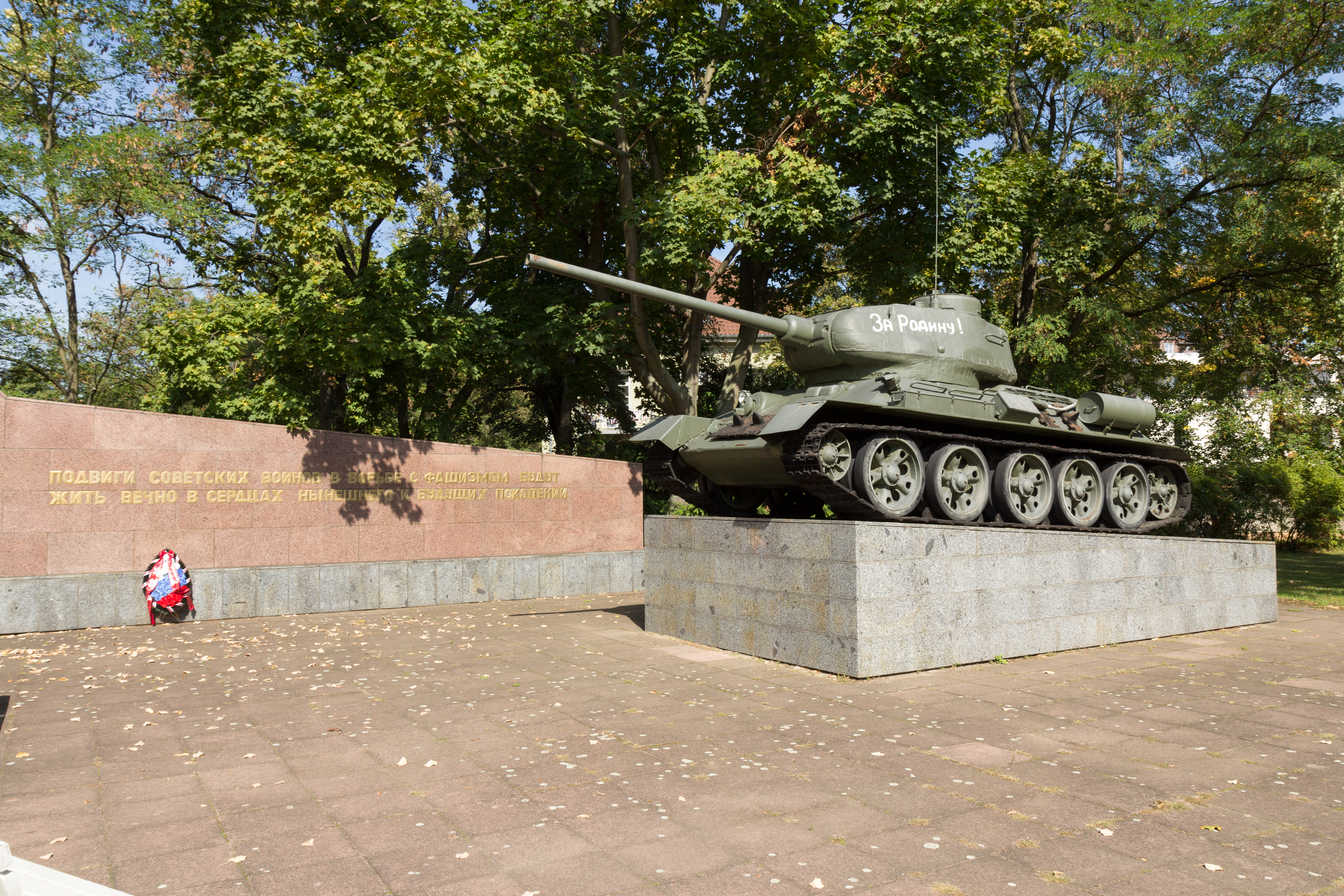 Denkmal mit sowjetischem T34 Panzer